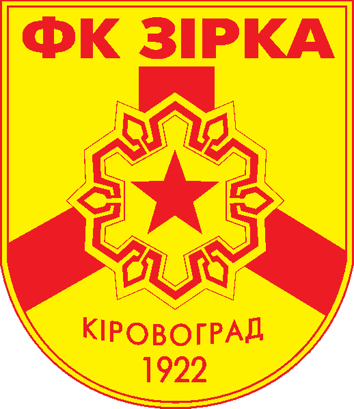 Емблема ФК Зірка Кіровоград 2008.png: Емблема ФК «Зірка» (Кіровоград) з 2008 року